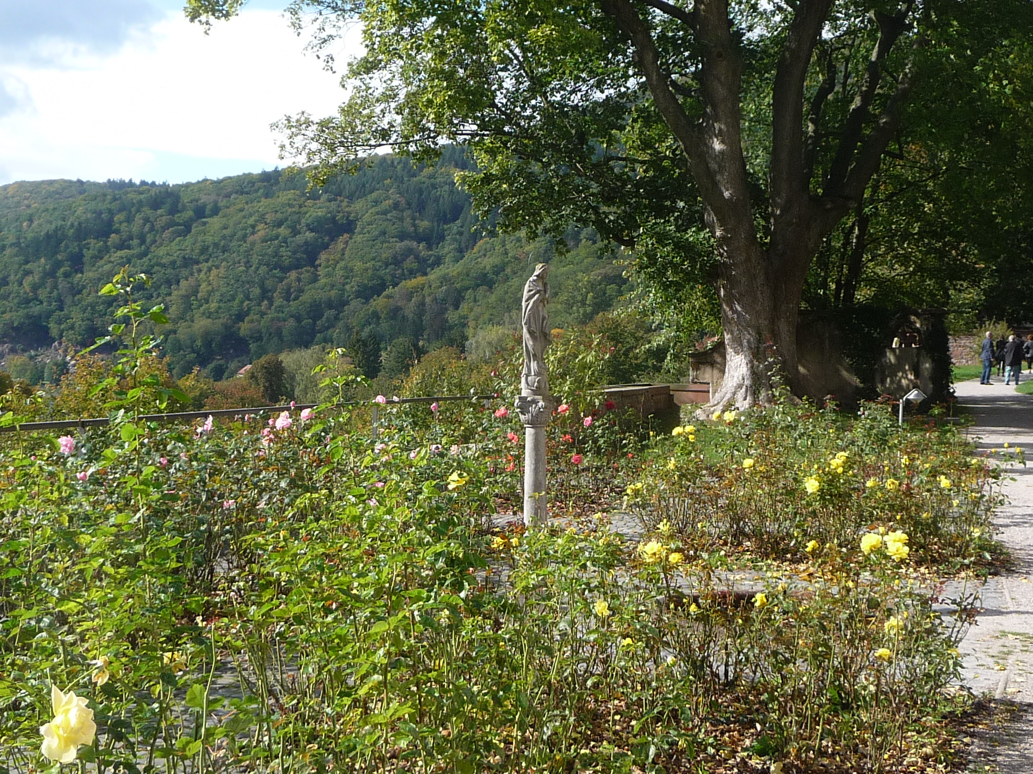 Die Abtei Neuburg (Abtei vom heiligen Bartholomäus) bei Heidelberg, auch als Stift Neuburg und Kloster Neuburg bekannt, ist ein Benediktinerkloster.